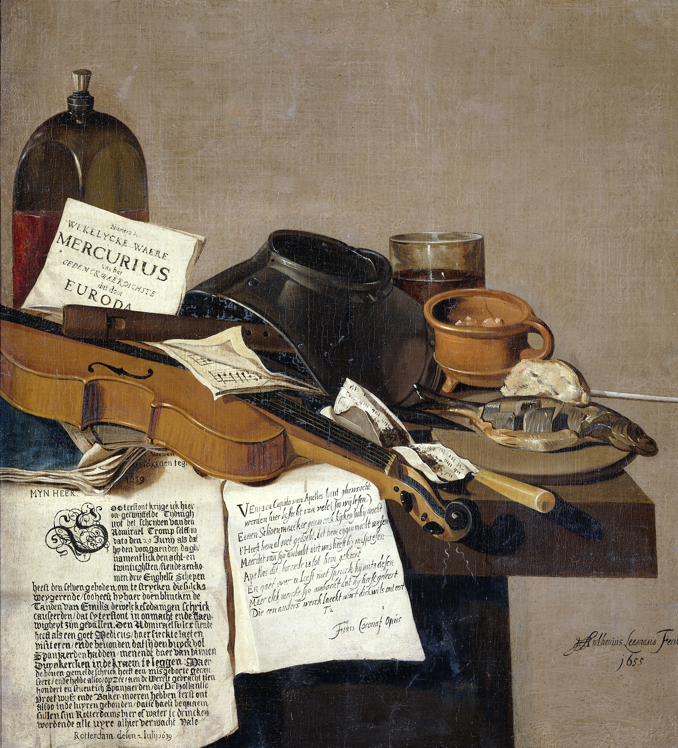 Stilleven met een exemplaar van De Waere Mercurius, een pamflet of nieuwsblad over Tromp's overmeestering van drie Engelse schepen op 28 juni 1639, een gedicht over de schoenmaker die het werk van Apelles misprijst, een viool en een fluit, een halsberg, een houten bord met een haring en een stuk brood, een testje met kolen en een glas.